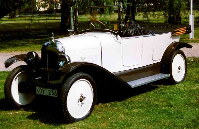 Citroen B2 Torpedo 1921